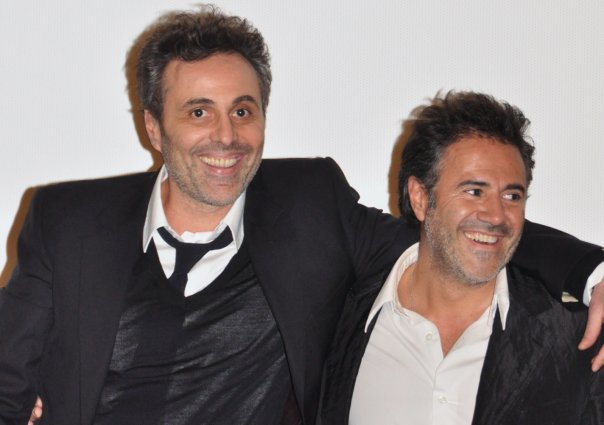 Gilbert Melki et José Garcia à l'avant-première du film Le Mac.